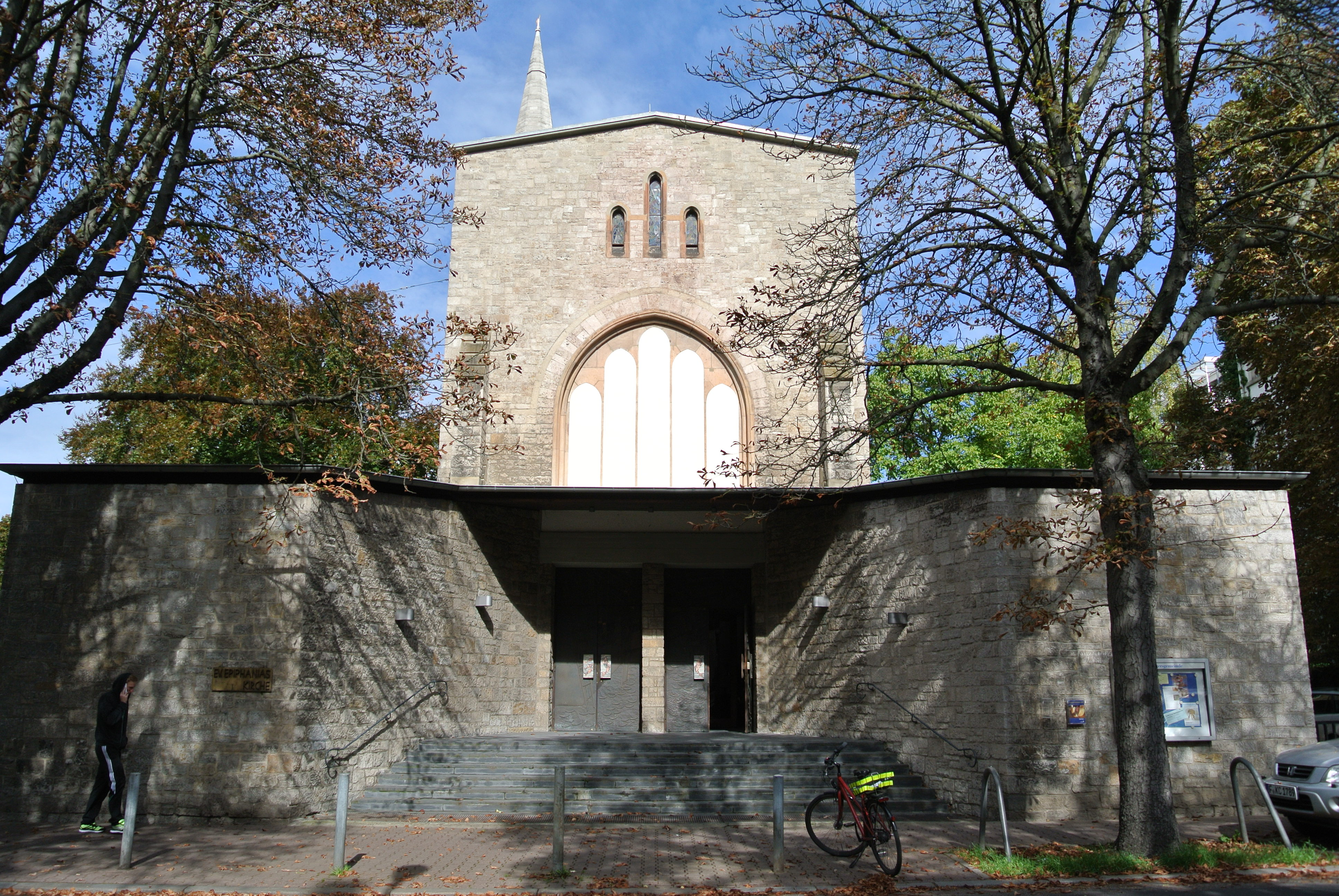 Epiphaniaskirche von Süden, eine Kirche aus den 1950er Jahren des Architekten Karl Wimmenauer unter Verwendung der Ruine der Immanuelkirche von 1903